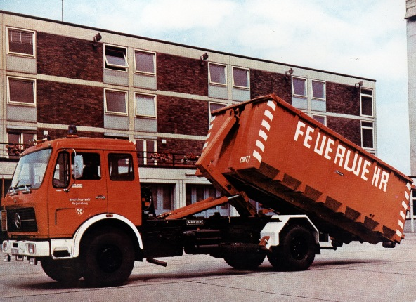 Meiller-Abrollkipper der Berufsfeuerwehr Regensburg auf L 1626-Chassis, 1979